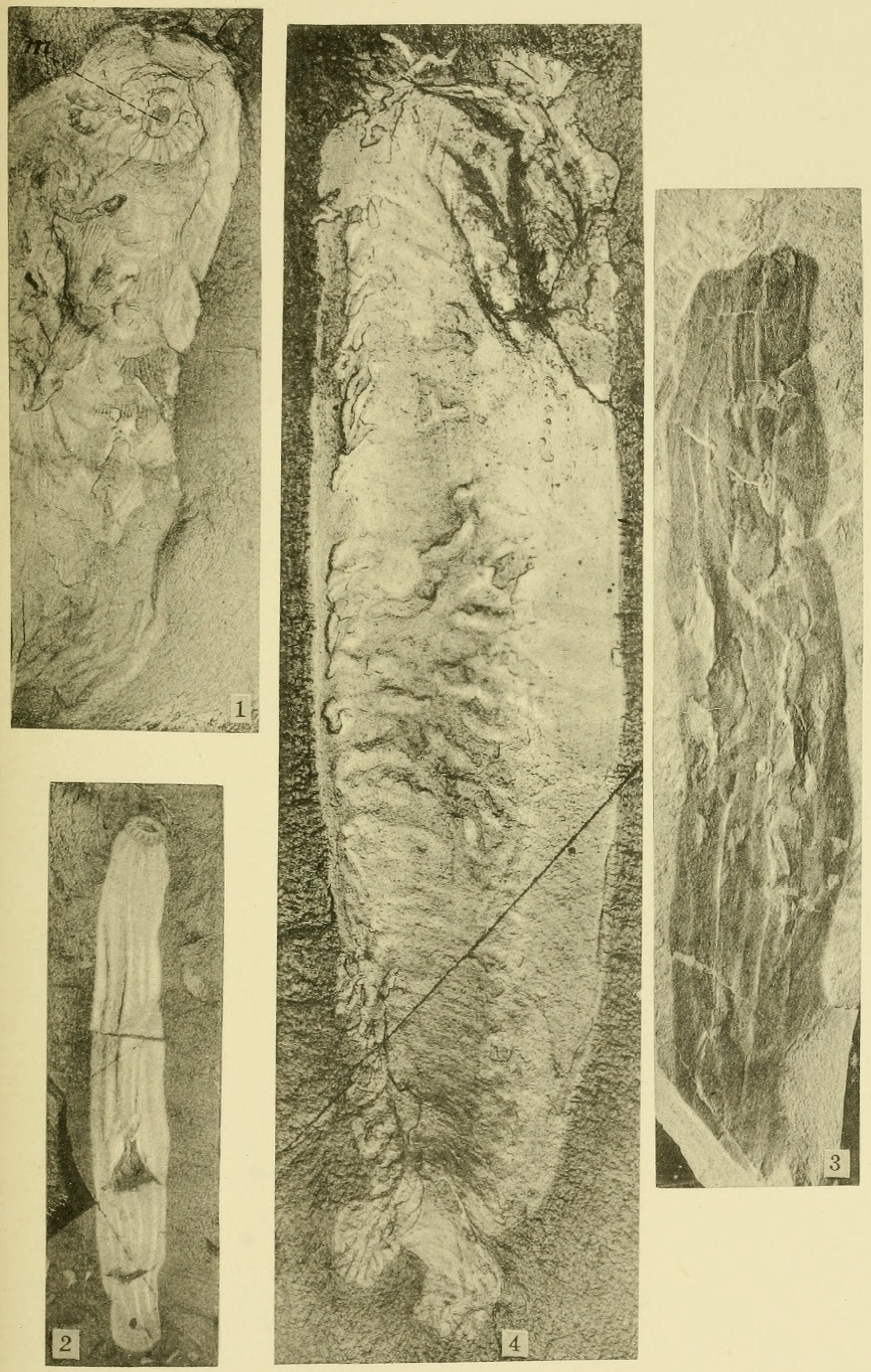 Plate 13: Middle Cambrian Holothurians (Laggania, Mackenzia, and Louisella) 1. Laggania cambria Walcott = 2. Mackenzia costalis Walcott = 3. Mackenzia costalis Walcott = 4. Louisella pedunculata Walcott =